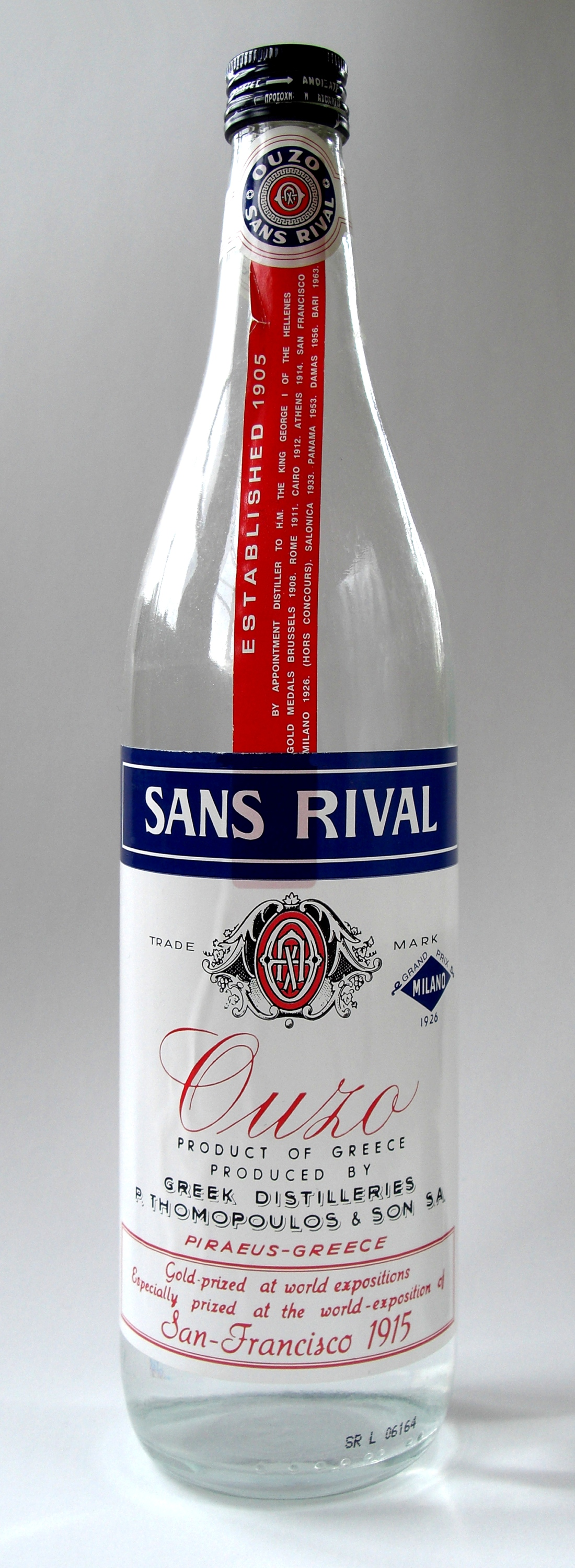 See title